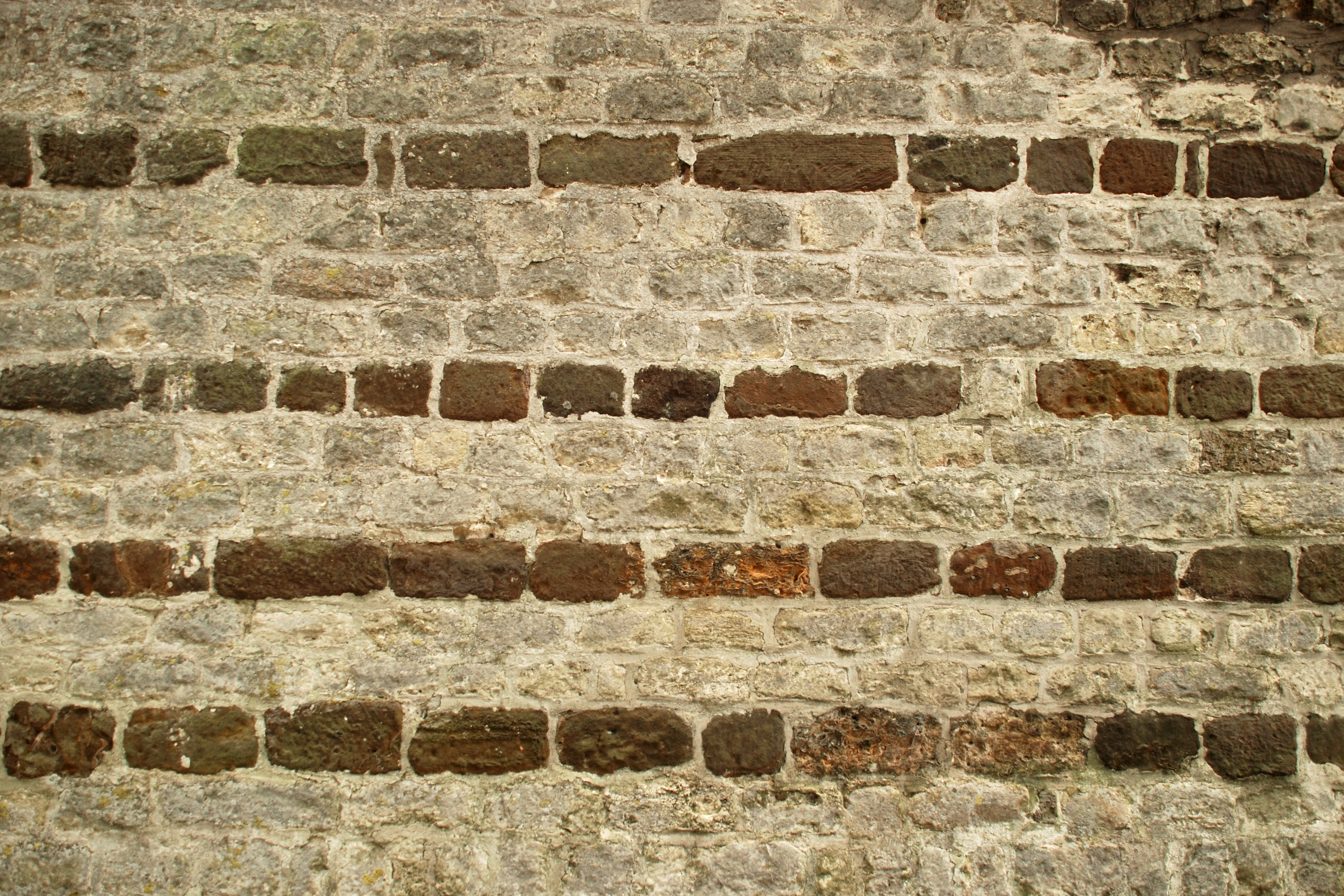 Belgique - Brabant wallon - Chaumont-Gistoux - Église Saint-Bavon de Chaumont